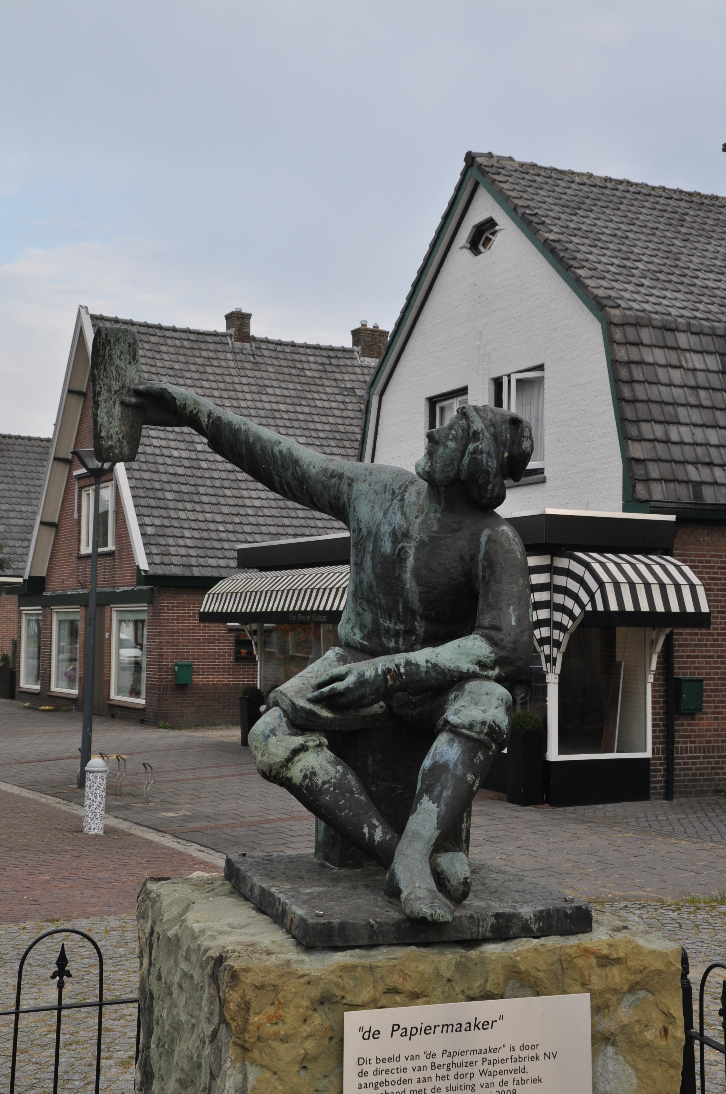 Beeld afkomstig van de in 2008 gesloten Berghuizer Papierfabriek te Wapenveld Unknown